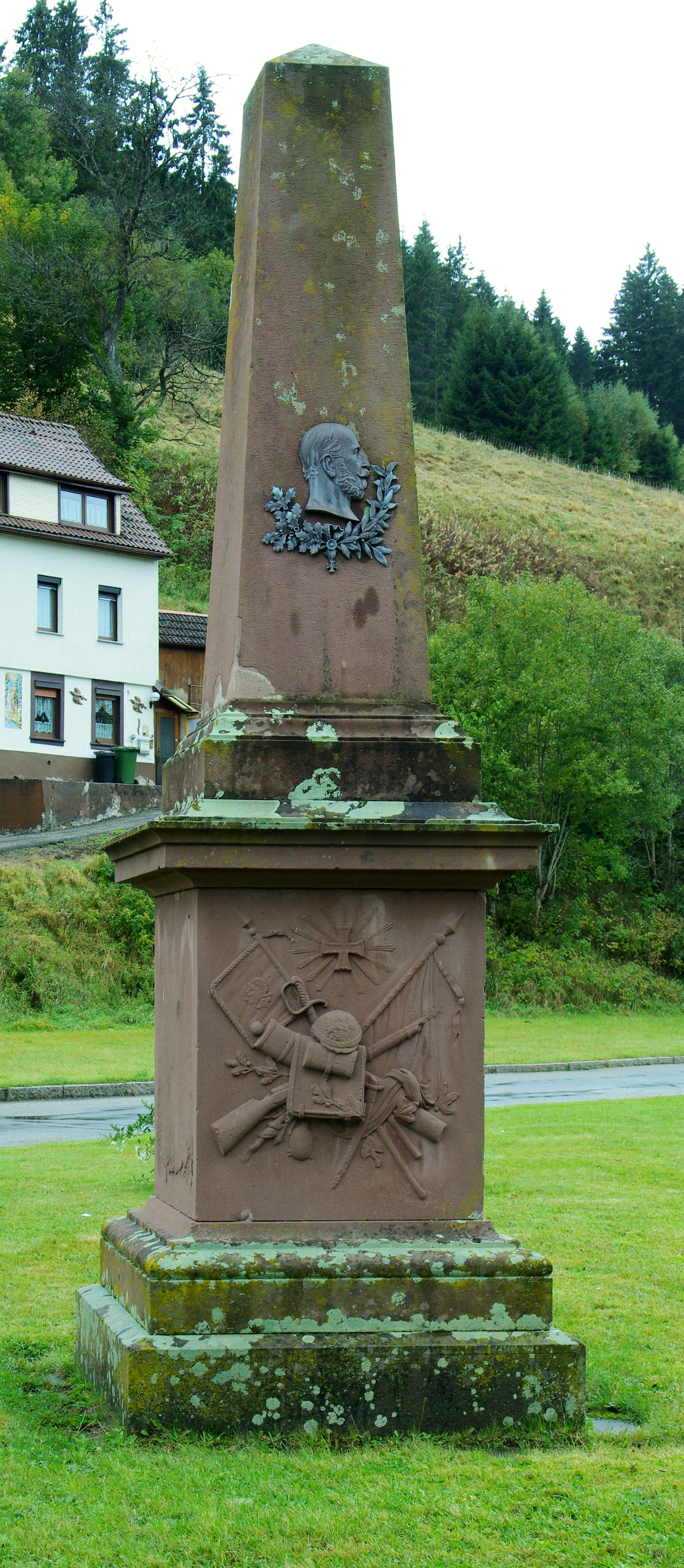 Die Pfarrkirche St. Martin in Vöhrenbach